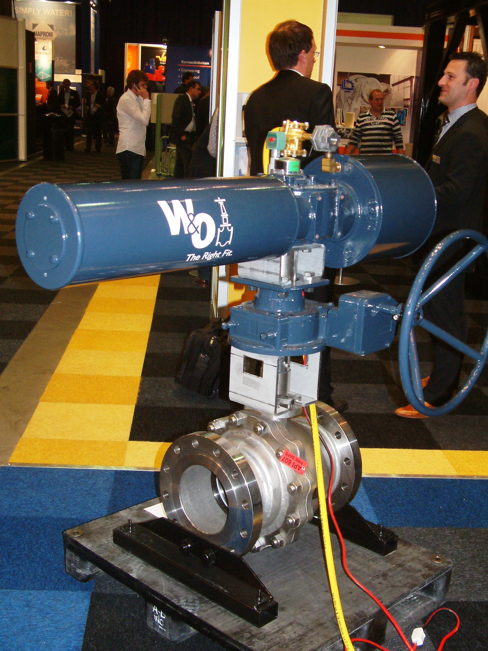 Europort 2009